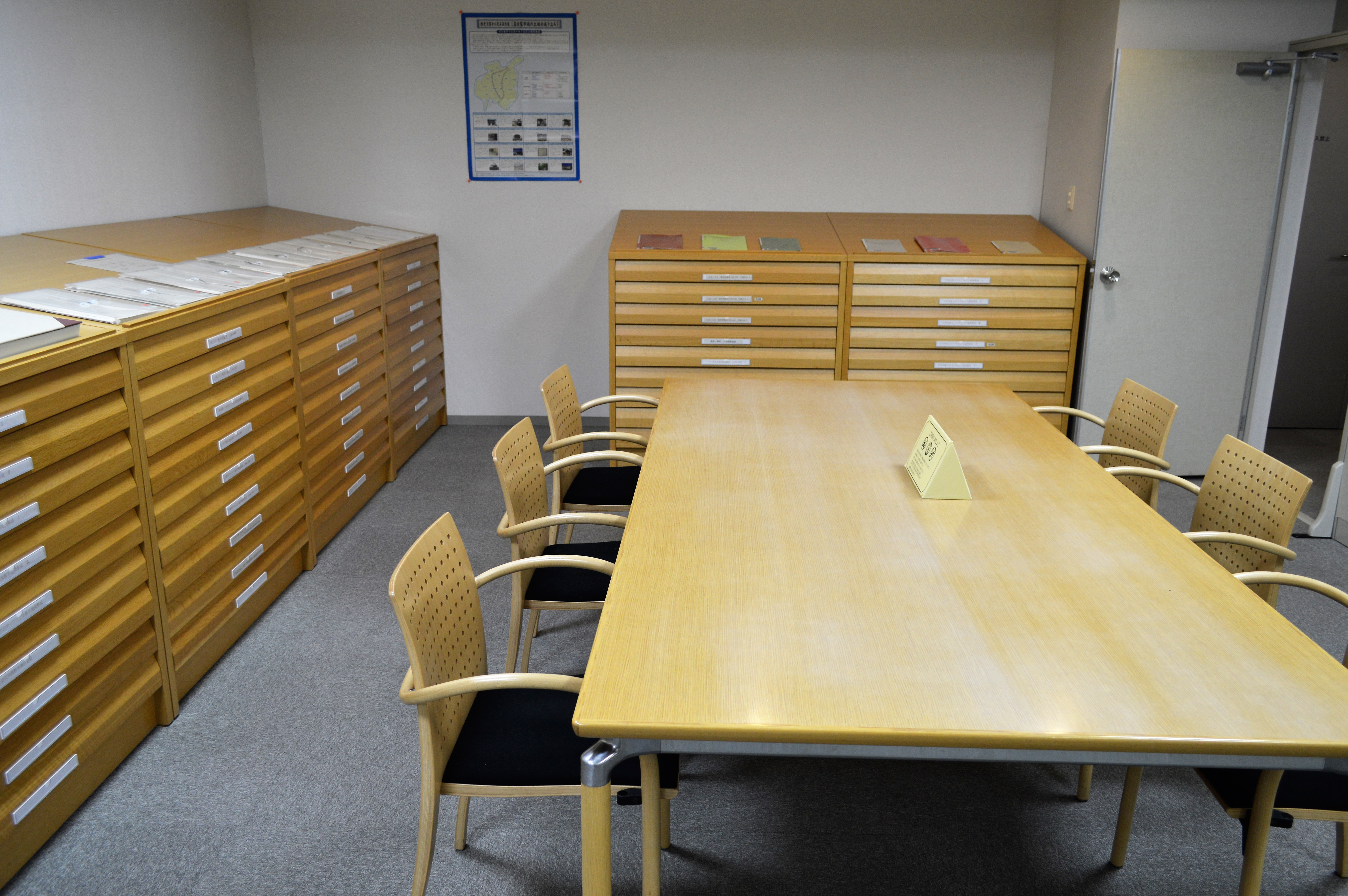 金山南ビル12階にある名古屋都市センターまちづくりライブラリー。